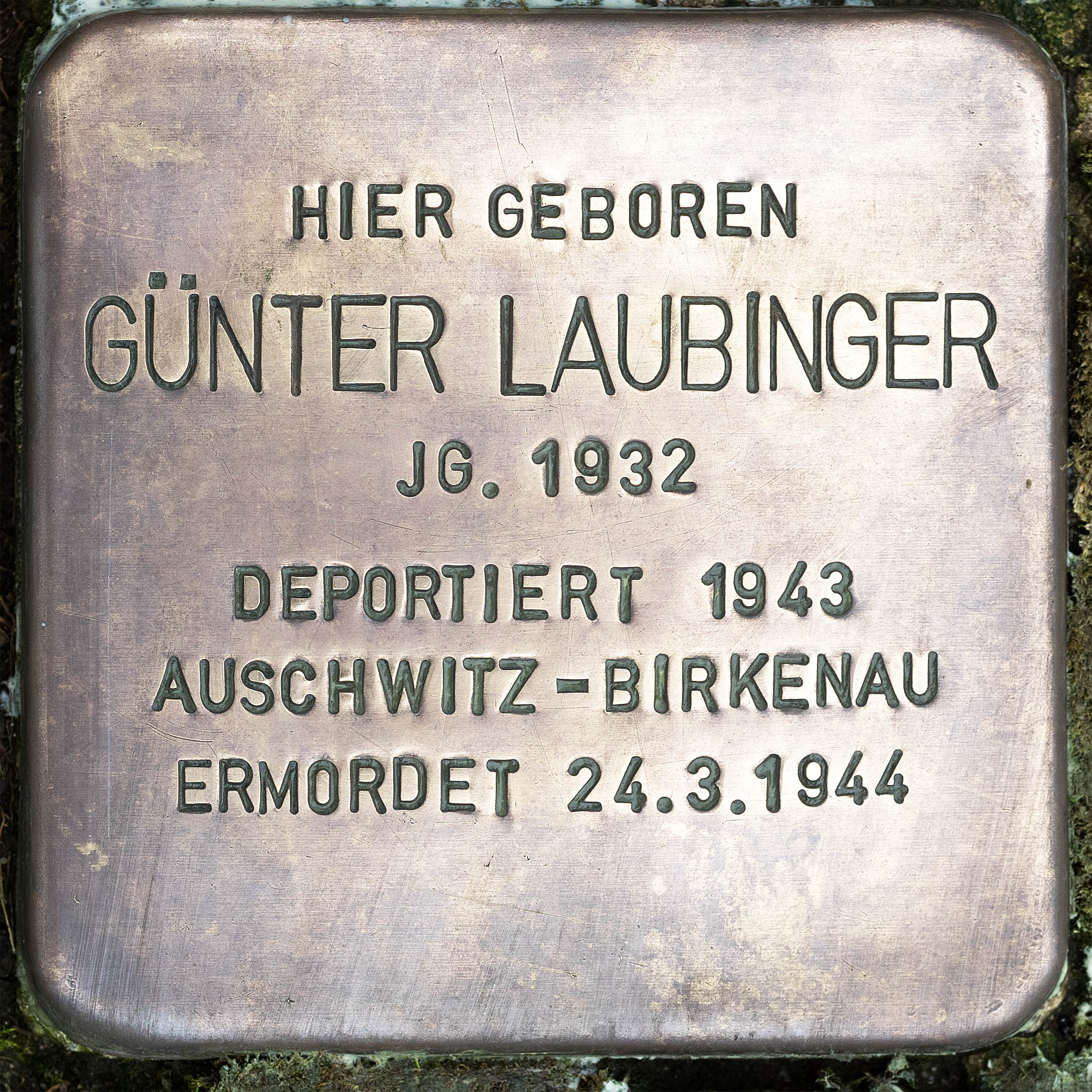 Stolperstein für Laubinger, Günter